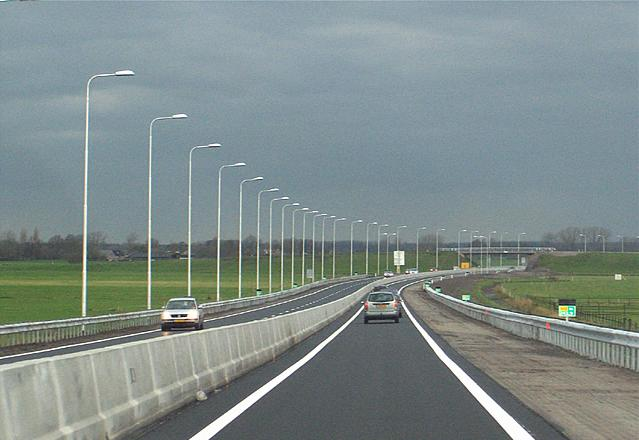 De N50 tussen Zwolle en Kampen.